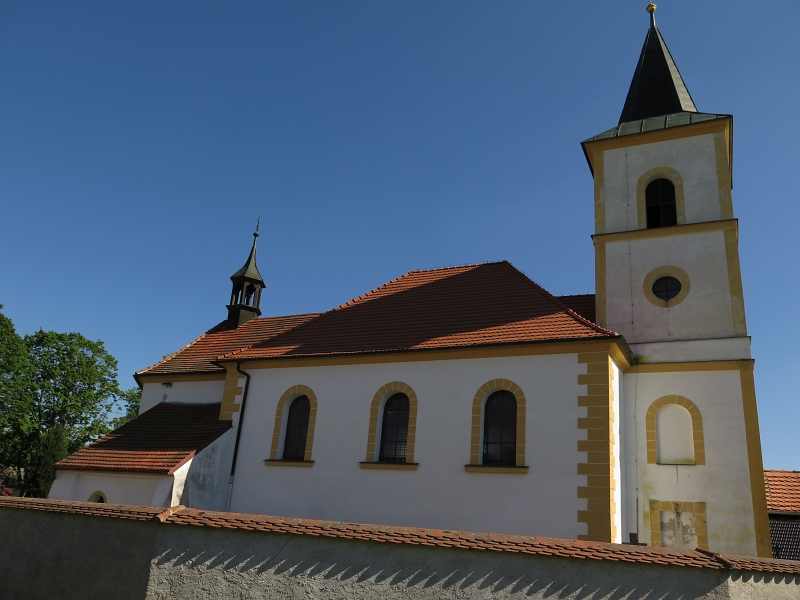 Kostel Nejsvětější Trojice, Vrcholtovice.